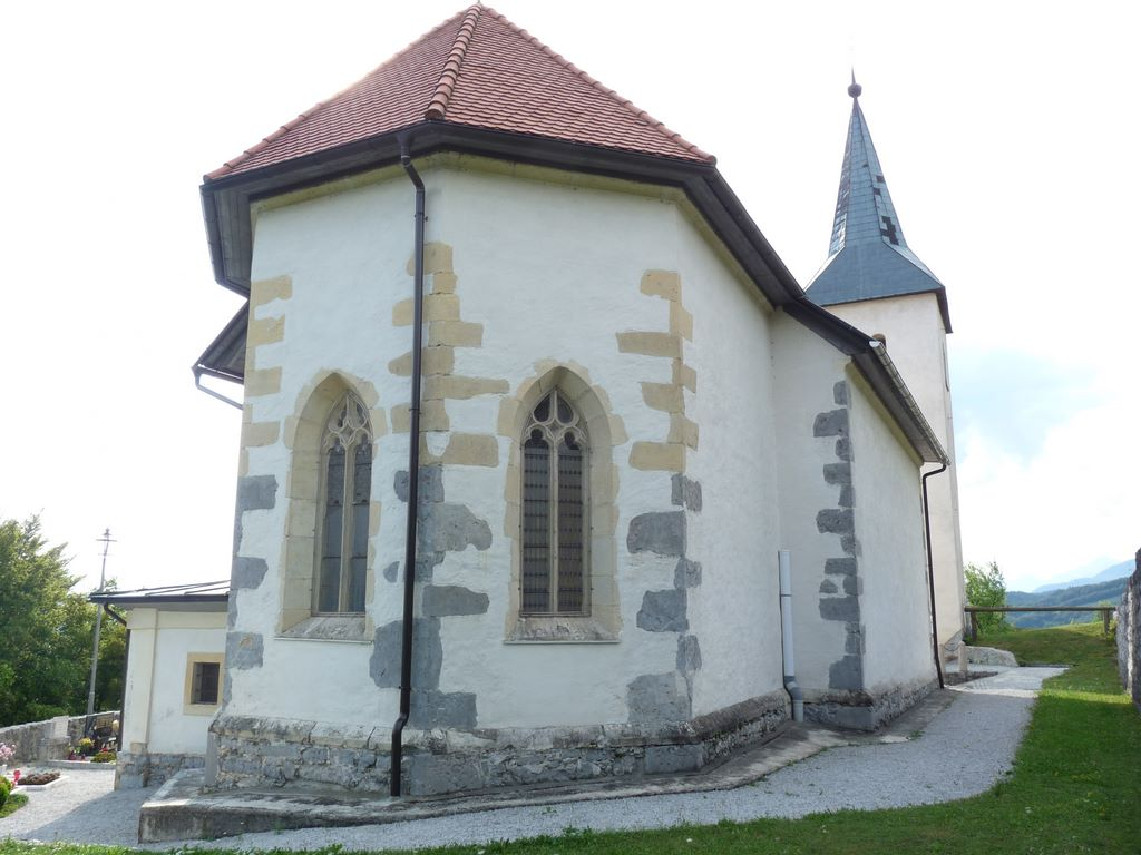 Sv. Marjeta nad Gradiščem pri Lukovici